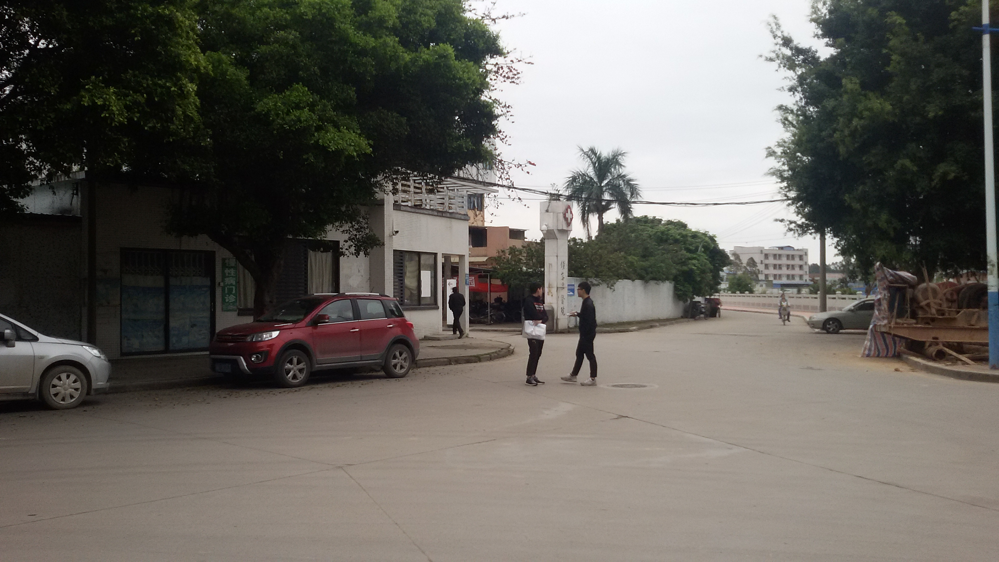 粵語: 鐘落潭醫院